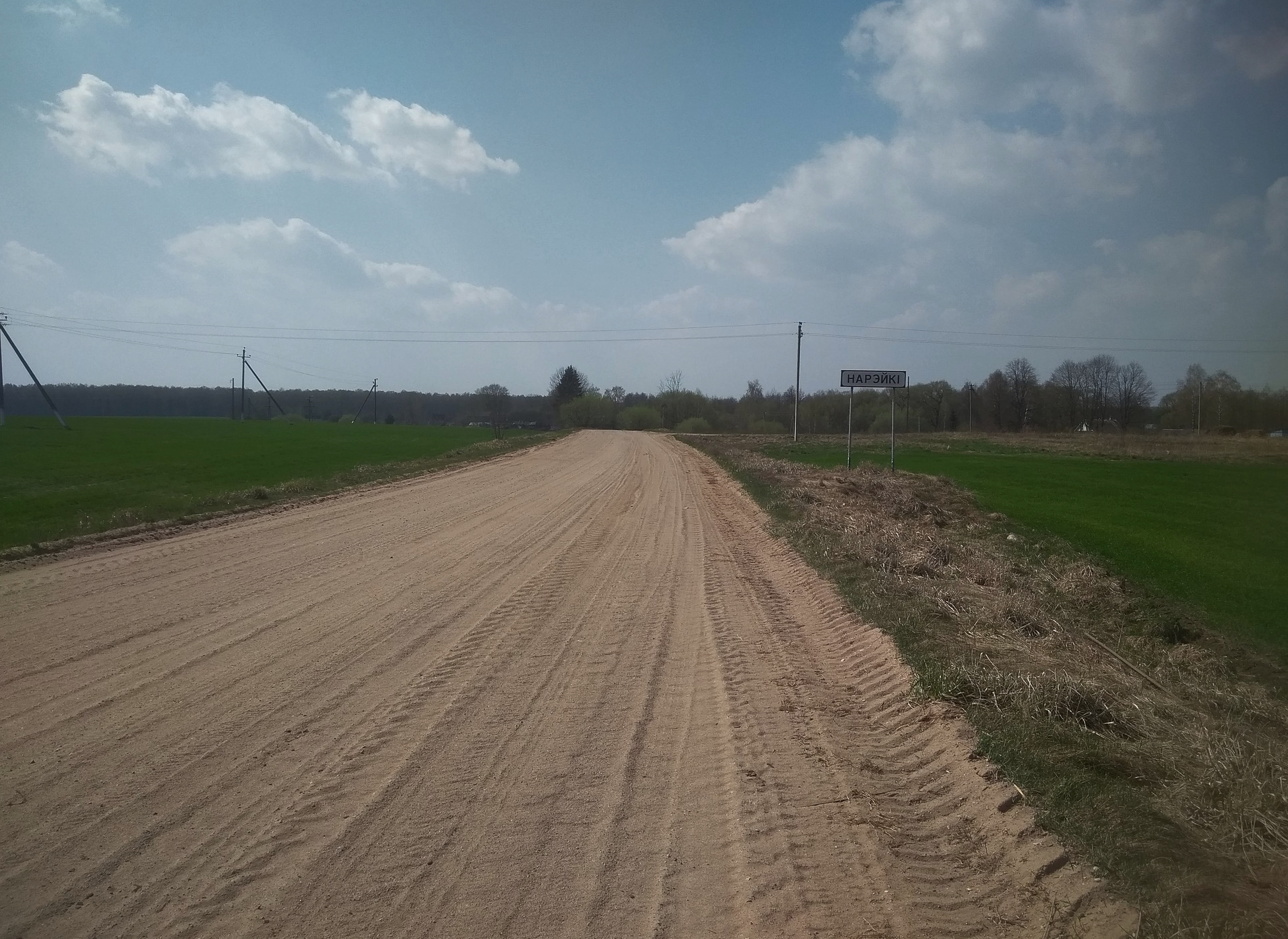 Автодорога Ляховичи-Негорелое в деревне Нарейки Станьковского сельсовета